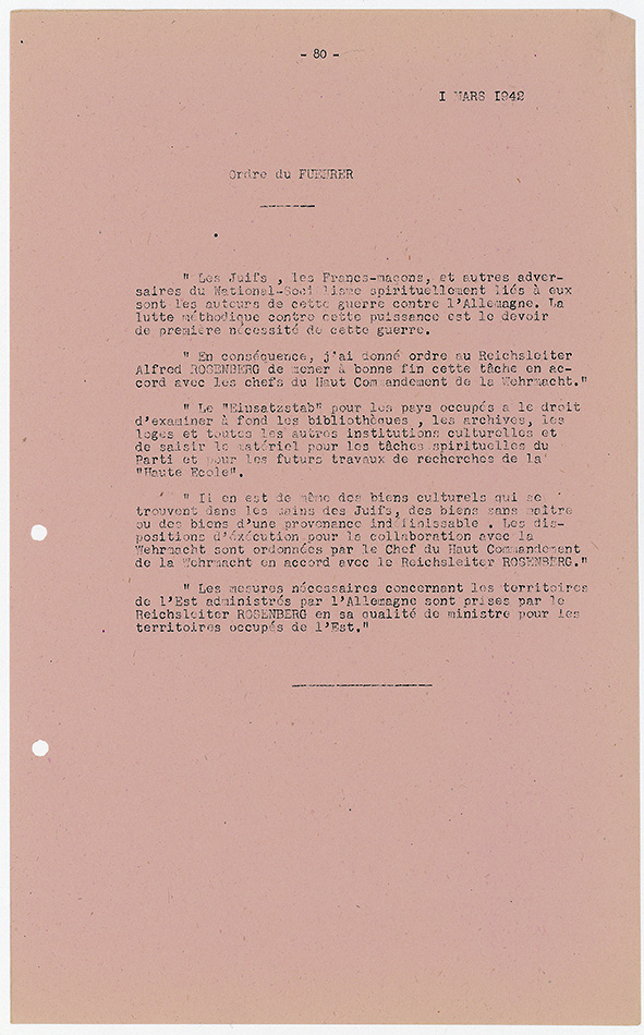 Traduction française d'un texte d'Adolf Hitler ordonnant de piller les archives et les bibliothèques des juifs, des francs-maçons et autres ennemis du national-socialisme.